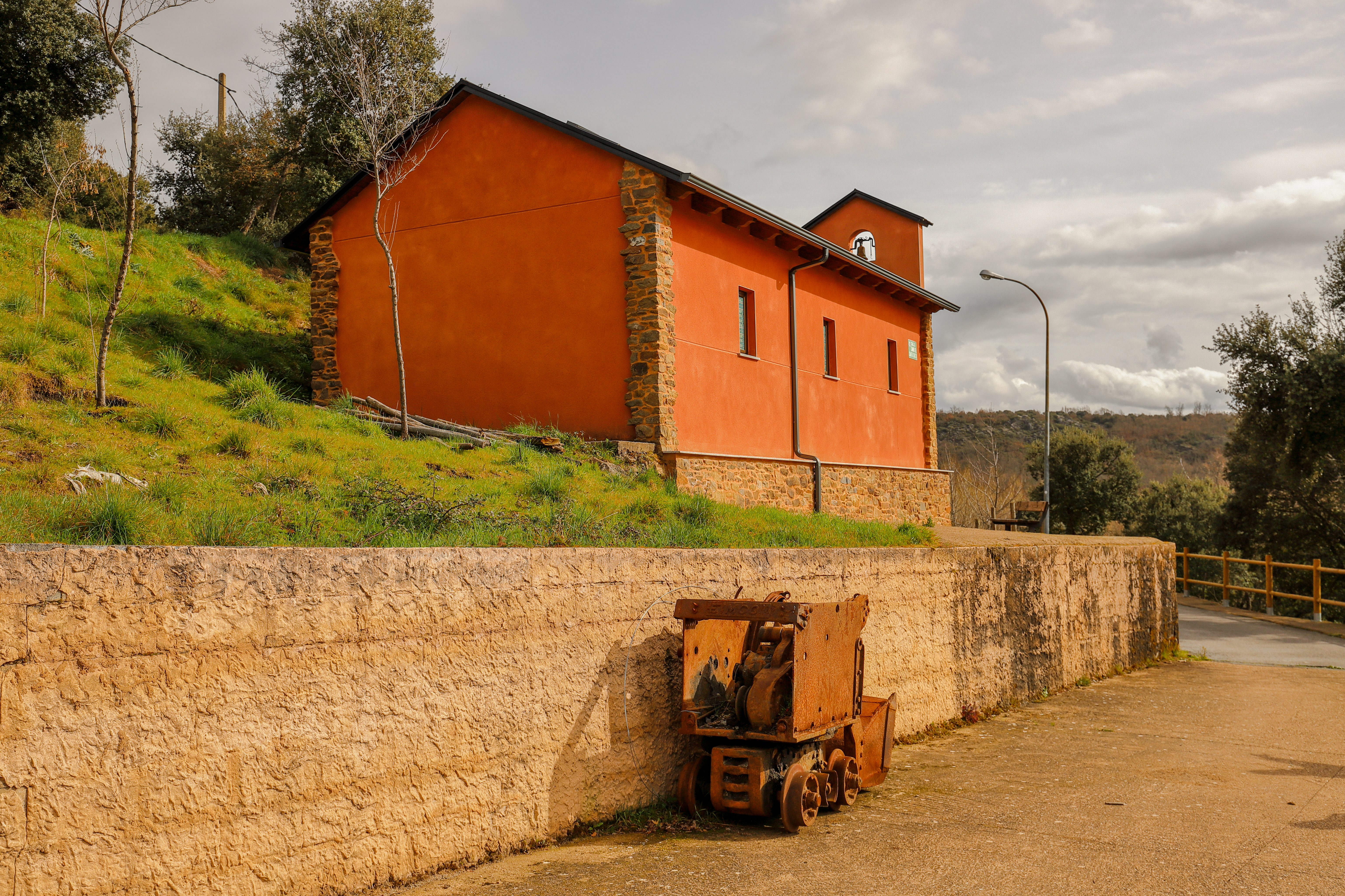 Labaniego es una localidad que pertenece al municipio de Bembibre, comarca de El Bierzo, provincia de León.